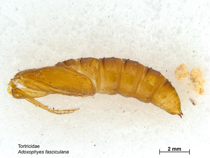 Adoxophyes fasciculana pupa